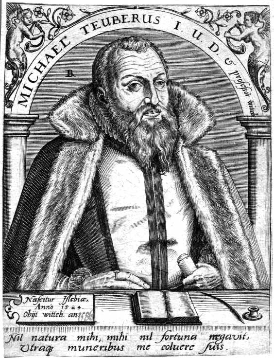 Michel Teuber, deutscher Jurist und Rechtswissenschaftler